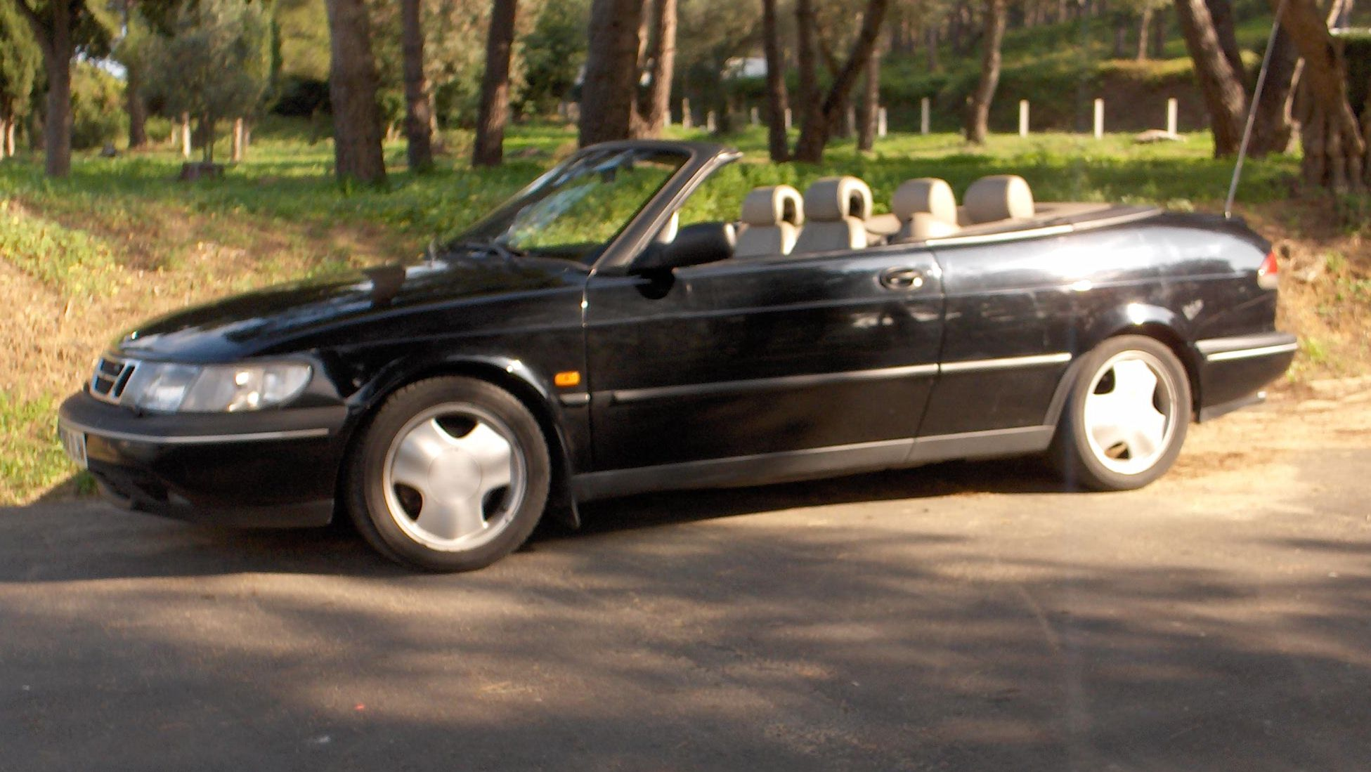 1995 Saab NG 900SE convertible